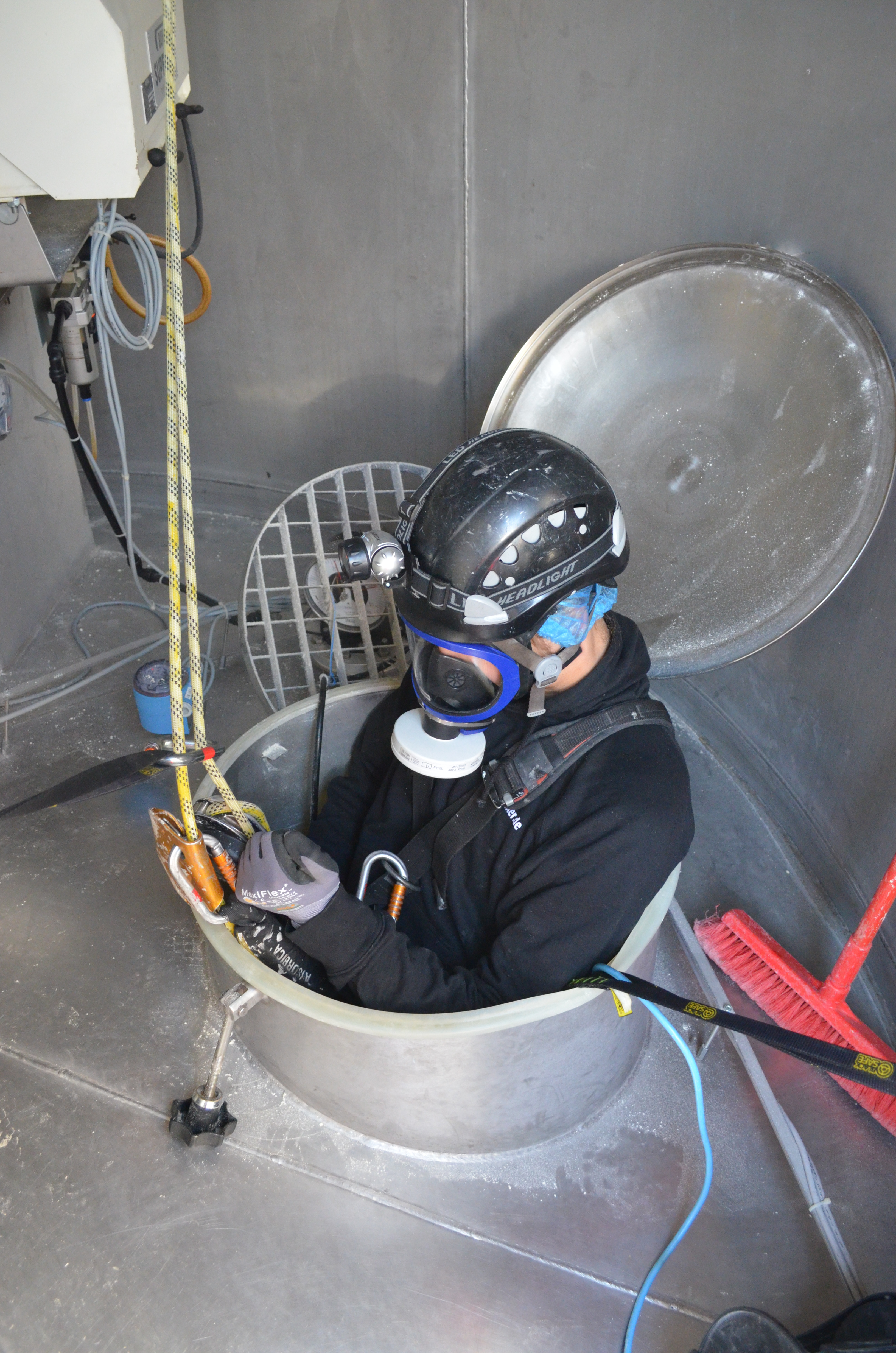 Ein nach FISAT und IRATA ausgebildeter Industriekletterer steigt in ein Maissilo um dieses zu reinigen. Bei den Arbeiten müssen laut Vorschrift mindestens 2 Industriekletterer vor Ort sein um eventuelle Rettungen garantieren zu können.